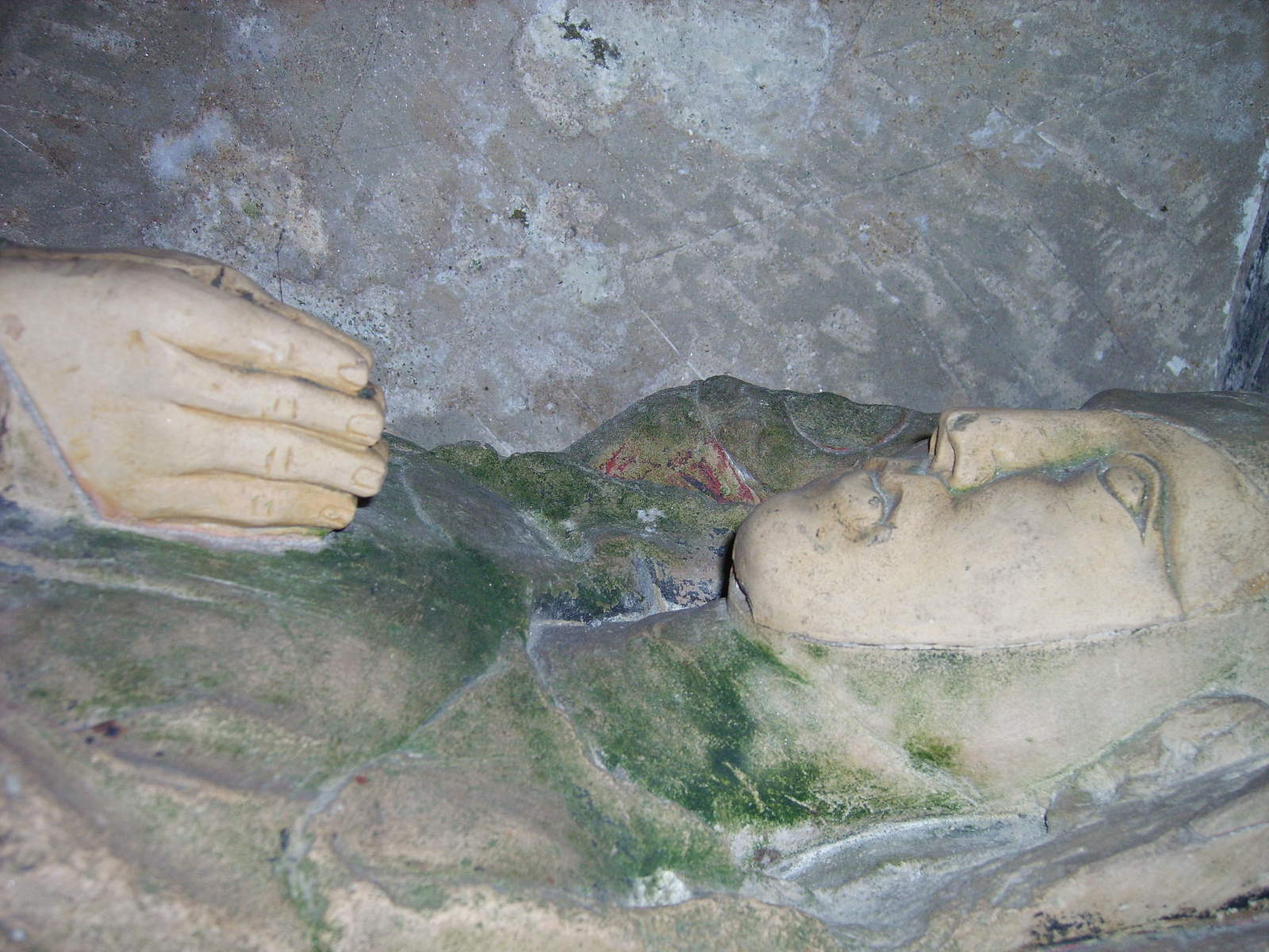 Kuŝostatuo de Gervaise de Dinan en la preĝejo de Léhon